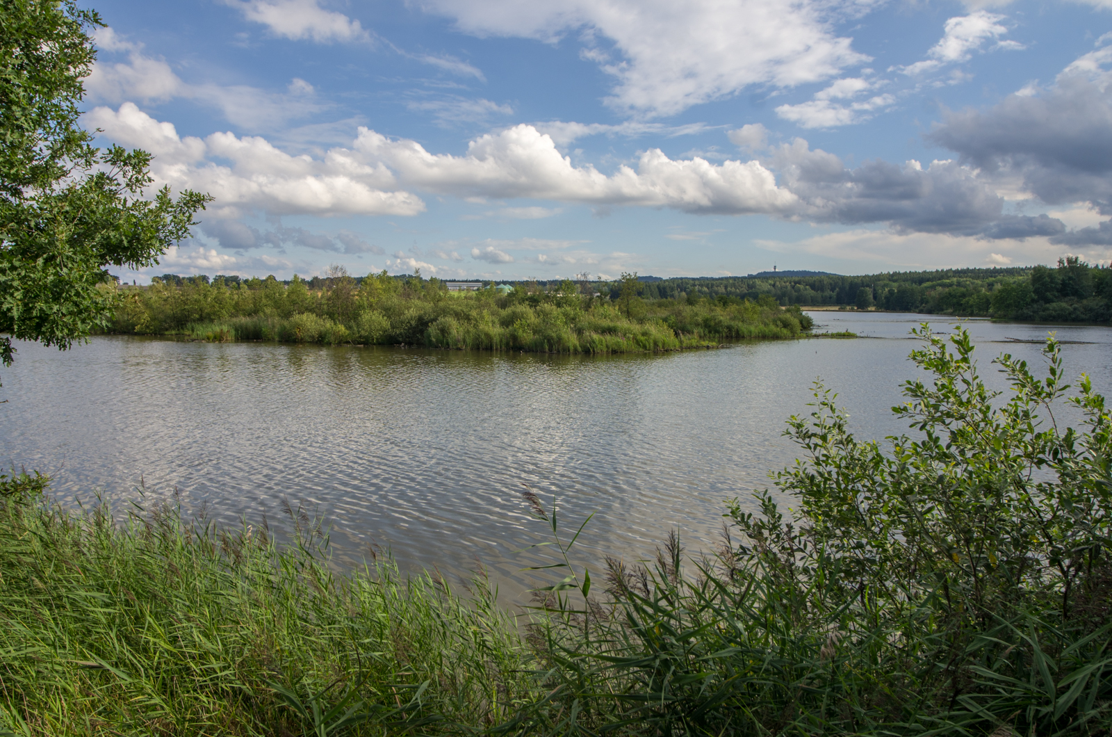 Přírodní rezervace Amerika, okres Cheb